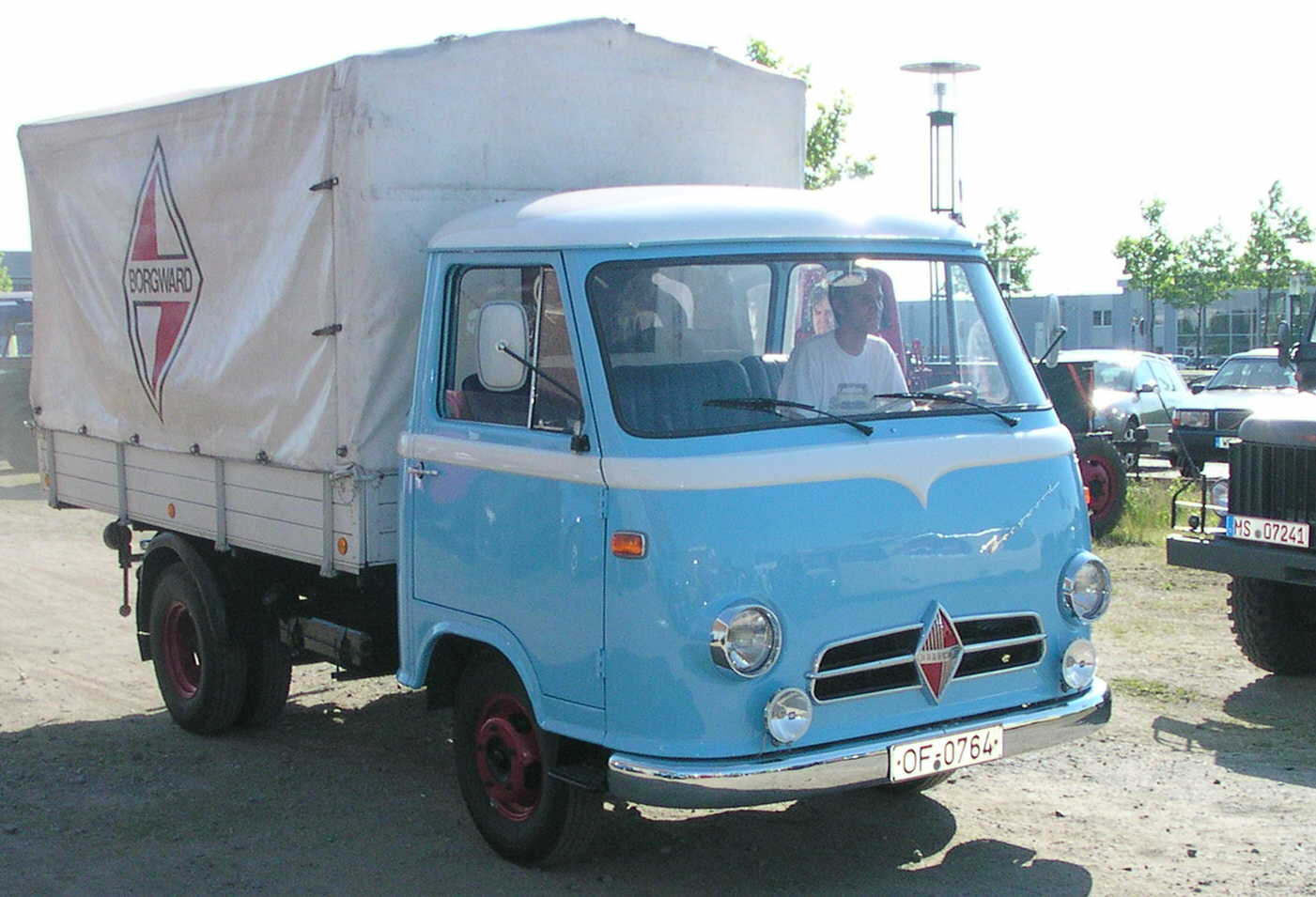 Willich, Borgward-Treffen im LKW-Museum, Borgward-LKW mit Borgward Logo auf der Plane, vermutlich B611